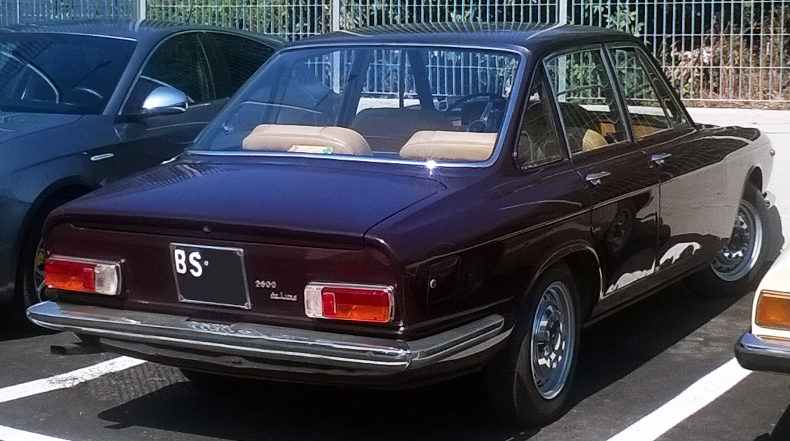 Alfa Romeo 2600 de Luxe